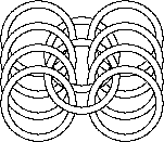 Motif de fabrication dit '6x1' des cottes de mailles